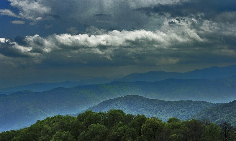 Вид на Качахакаберд